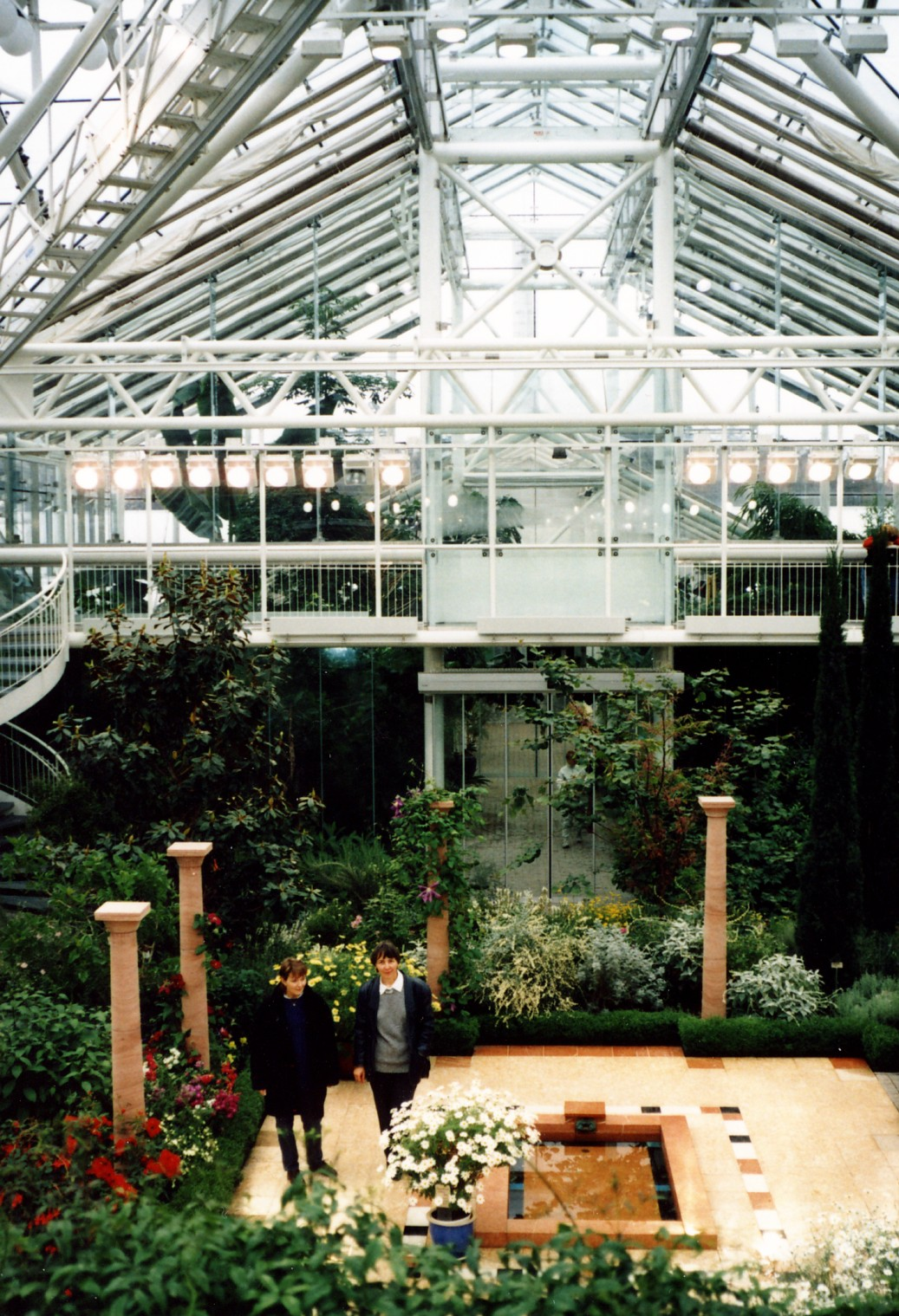 Bergianska trädgården i Stockholm